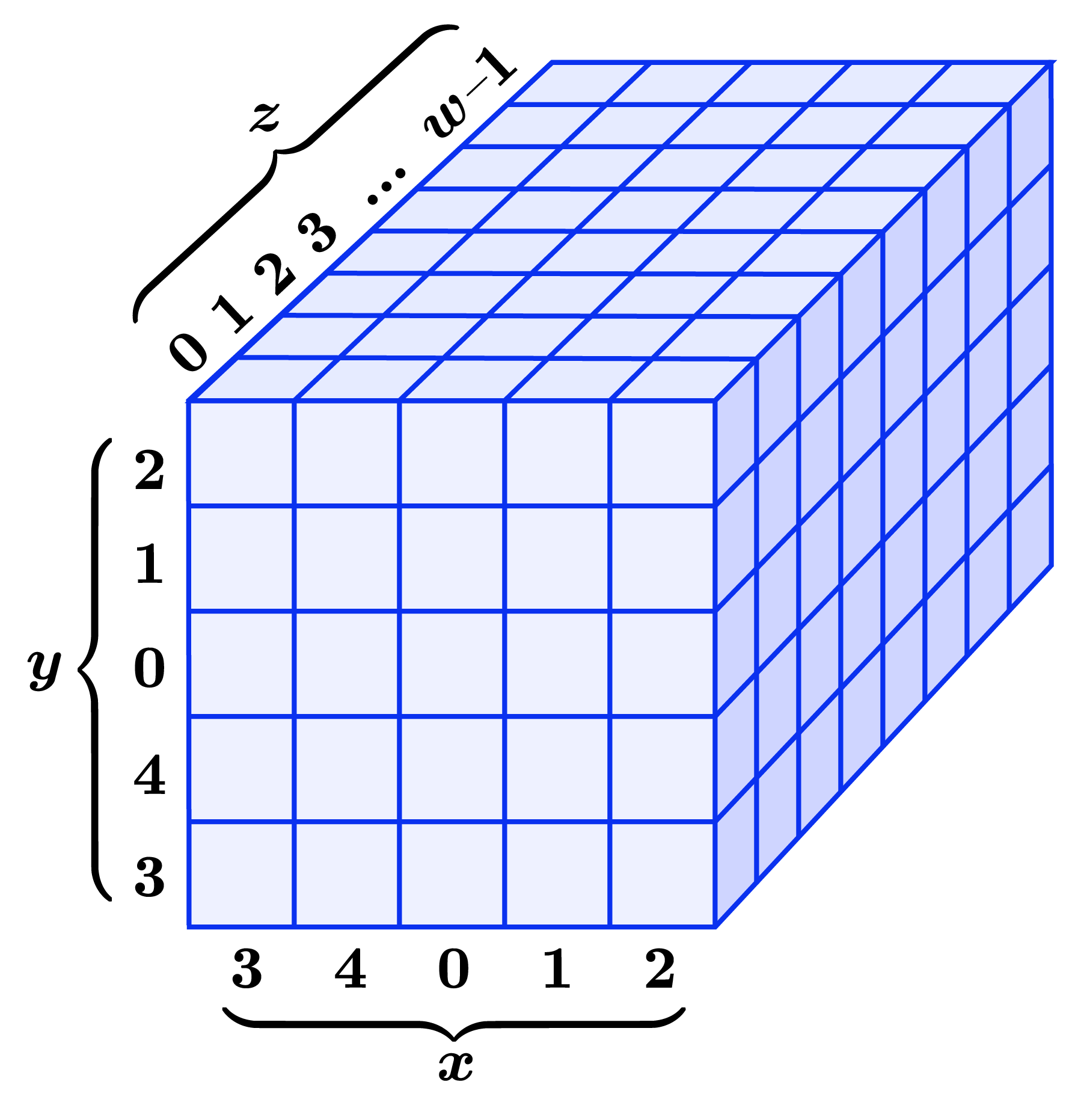 תיאור המצב הפנימי של Keccak